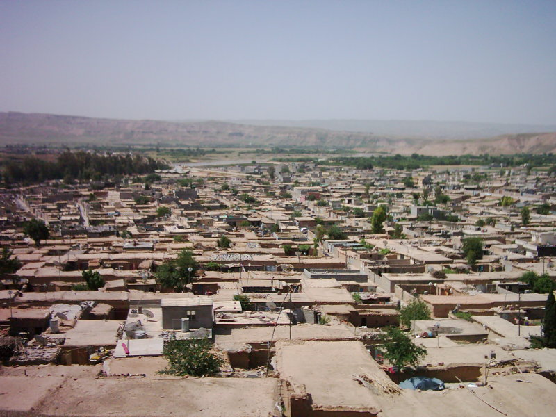 Taqtaq